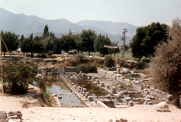 Die seit Jahrhunderten langsam voranschreitende Verlandung des Xanthos führt zu einer steten Versumpfung des Geländes. Die hellenistische Stoa liegt heute unter dem Grundwasserspiegel und erschwert damit die archäologische Erforschung des antiken Heiligtums.